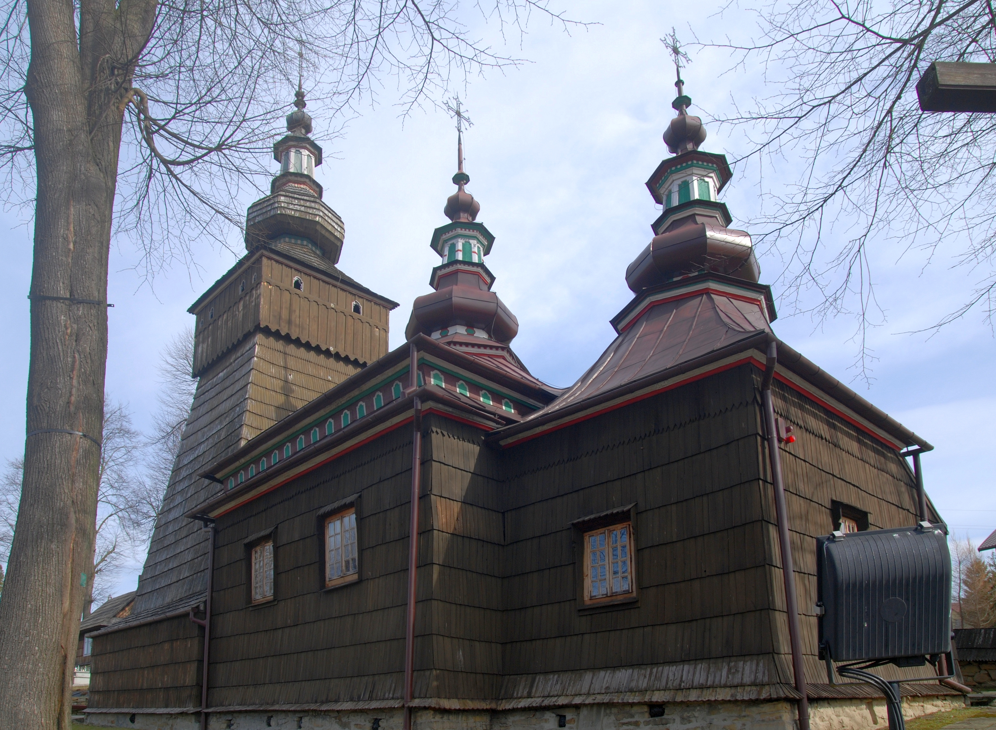 wieś Andrzejówka